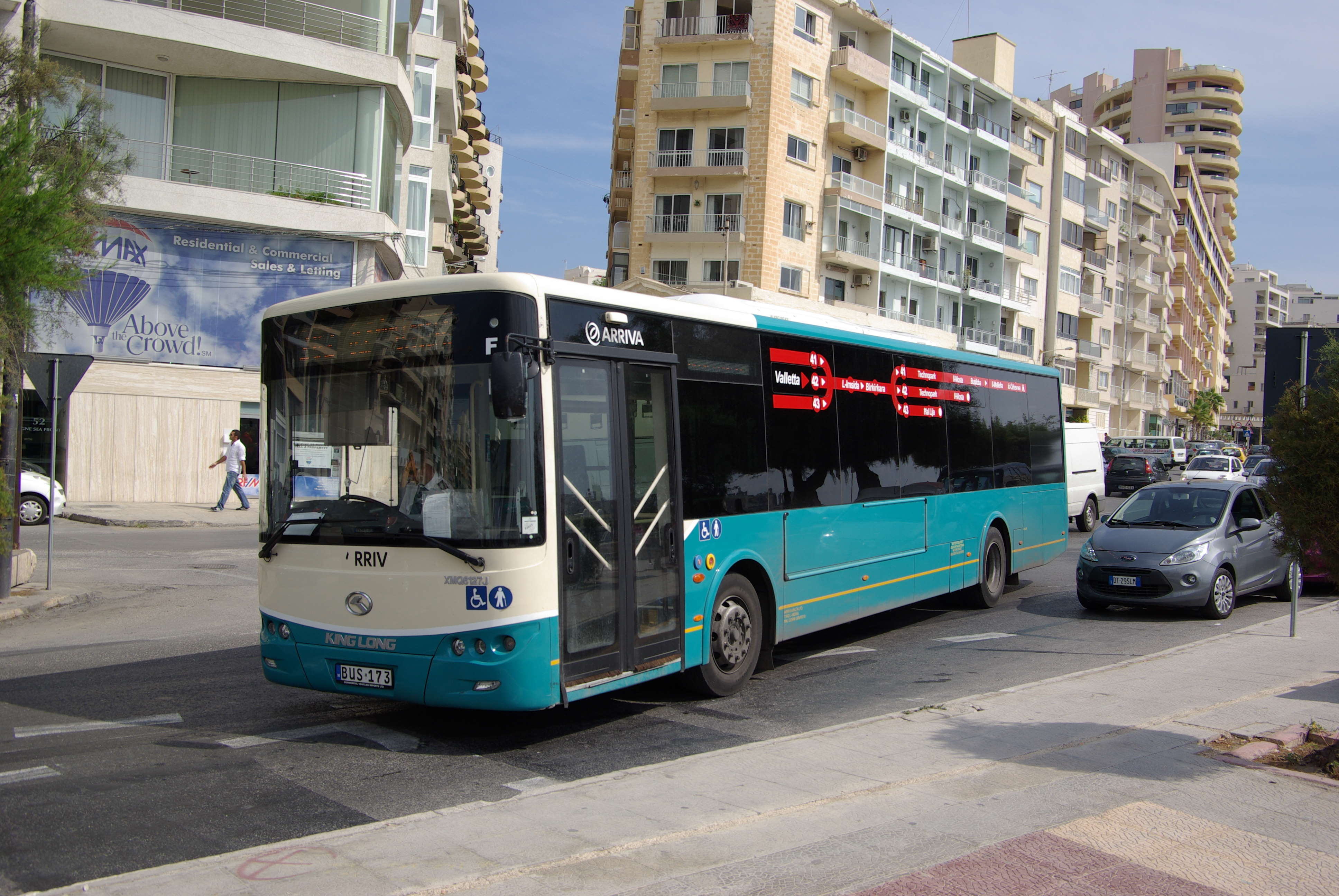 Neuer Bus auf Malta, im Juli 2011 wurden die Oldtimerbusse durch neue ersetzt